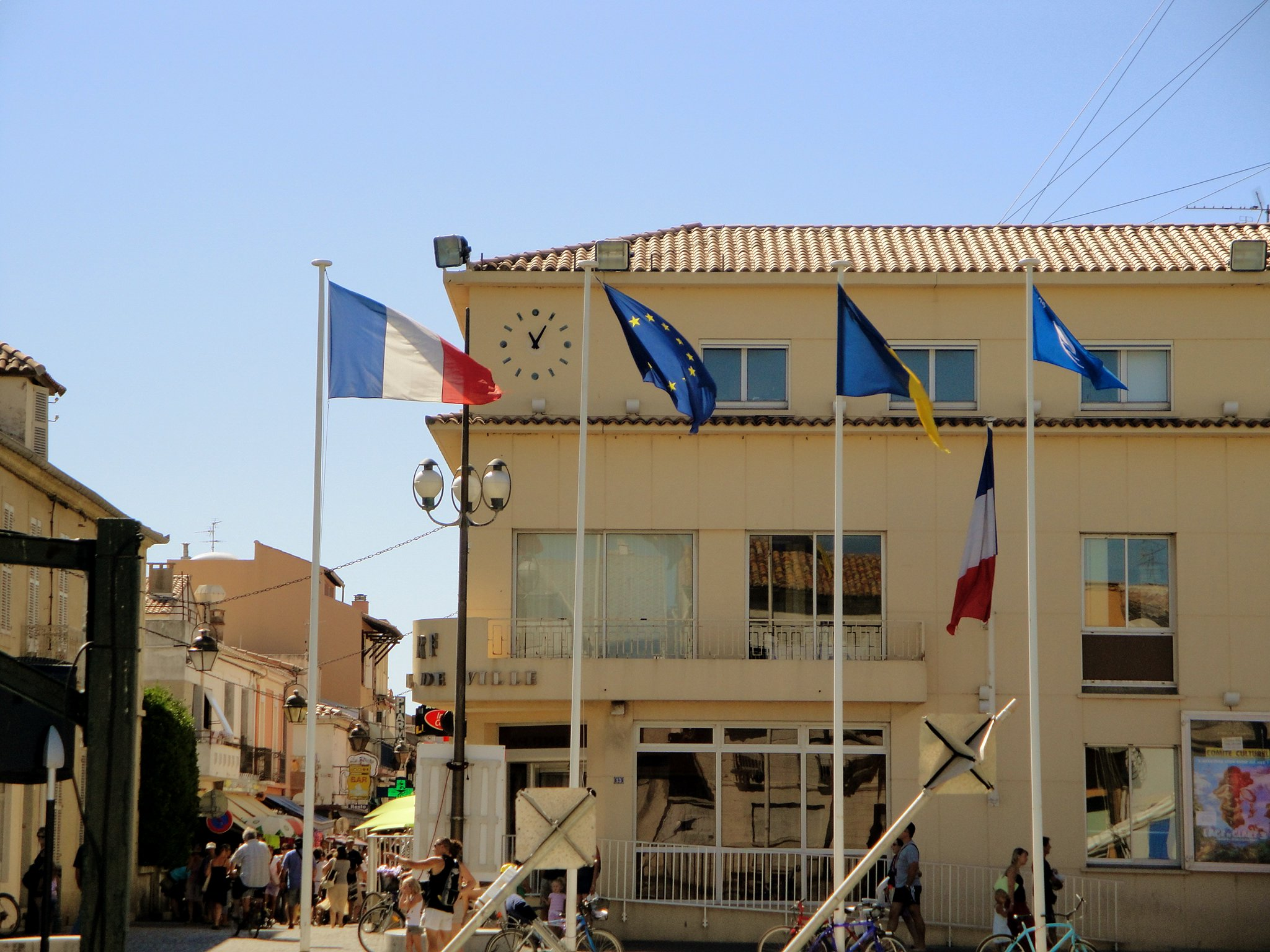 Hôtel de Ville